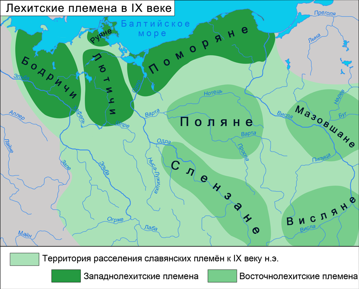 Карта размещения лехитских племён в IX веке. На основе данных: Lehr-Spławiński T. Język polski. Pochodzenie, powstanie, rozwój. Warszawa, 1978 (размещение и состав племенных западнолехитских групп) Ананьева Н. Е. История и диалектология польского языка: Учебник. Изд. 3-е, испр. — М.: Либроком, 2009, с. 19 — 20 Карта размещения племенных диалектов западных славян в 800 -950 гг. Карта польских племён. Dejna K. Dialekty polskie. Wrocław, 1973 (размещение племён на территории современной Польши в допястовскую эпоху) Skupisko etniczno-językowe plemienia Polan (C). Źródło: Dejna 1 Gwary polskie. Przewodnik multimedialny pod redakcją Haliny Karaś. Dialekty polskie — historia Współczesny język polski. Handke K. Terytorialne odmiany polszczyzny. Lublin, 2001 Западная граница и территория расселения славян в IX веке